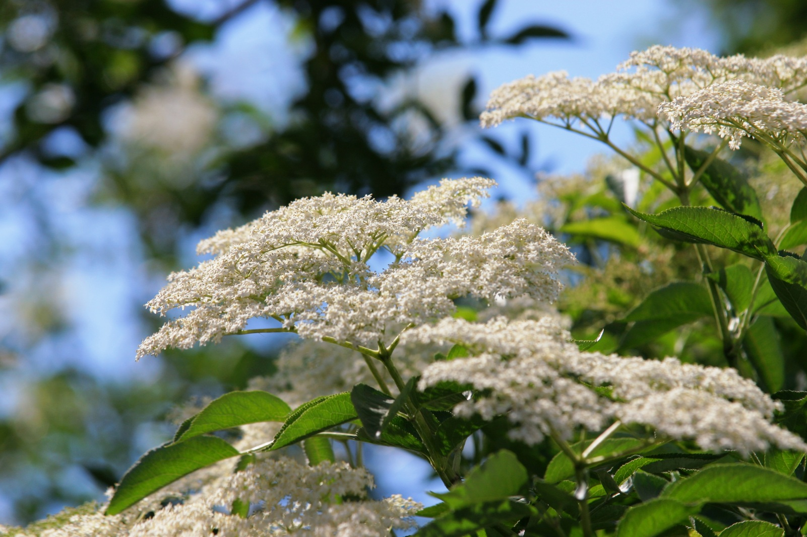 Fleurs de sureau noir (Sambucus nigra).